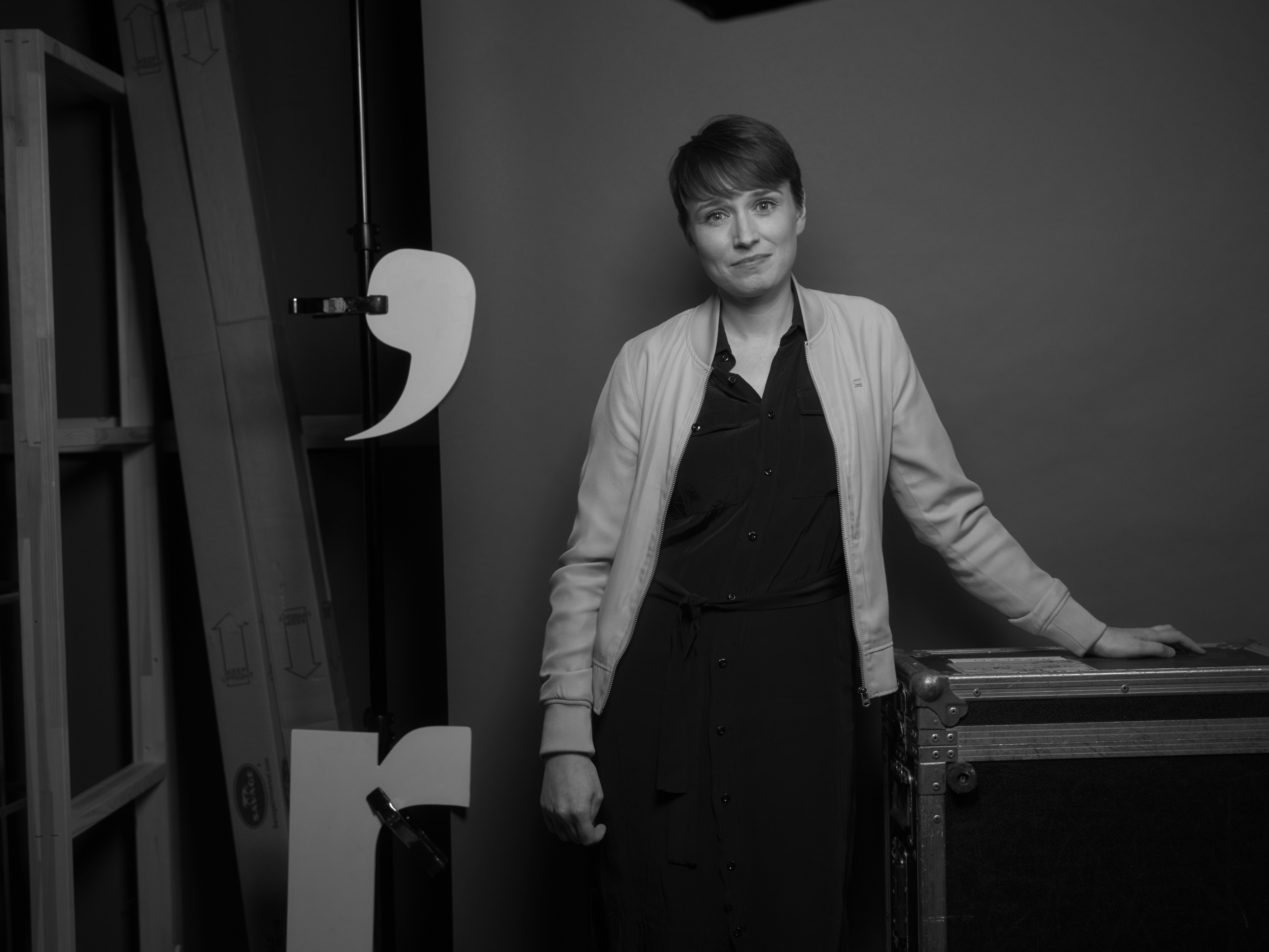 Speakerin Sigi Maurer